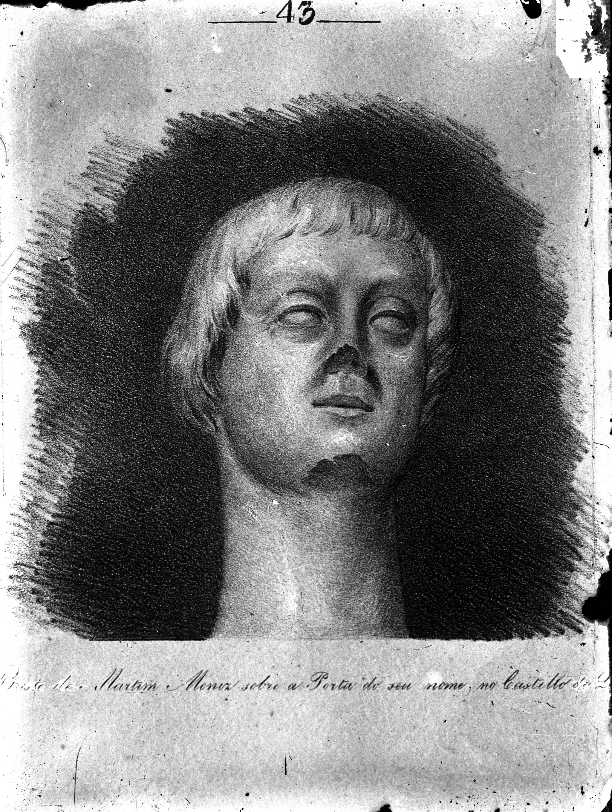 Título: Castelo de São Jorge. Busto de Martim Moniz sobre a porta de seu nome. Desenho de Sendim, século XIX Dimensão: 9 x 12 cm Suporte: Negativo de gelatina e prata em vidro Unidades de descrição relacionadas: Cód. Referência: PT/AMLSB/POR/053081 Título: Busto de Martim Moniz sobre a porta de seu nome no Castelo de São Jorge Notas: Inscrição no original: 6135; C12 Assunto: Castelo de São Jorge / Desenho / Busto Código de referência: PT/AMLSB/BAR/000087